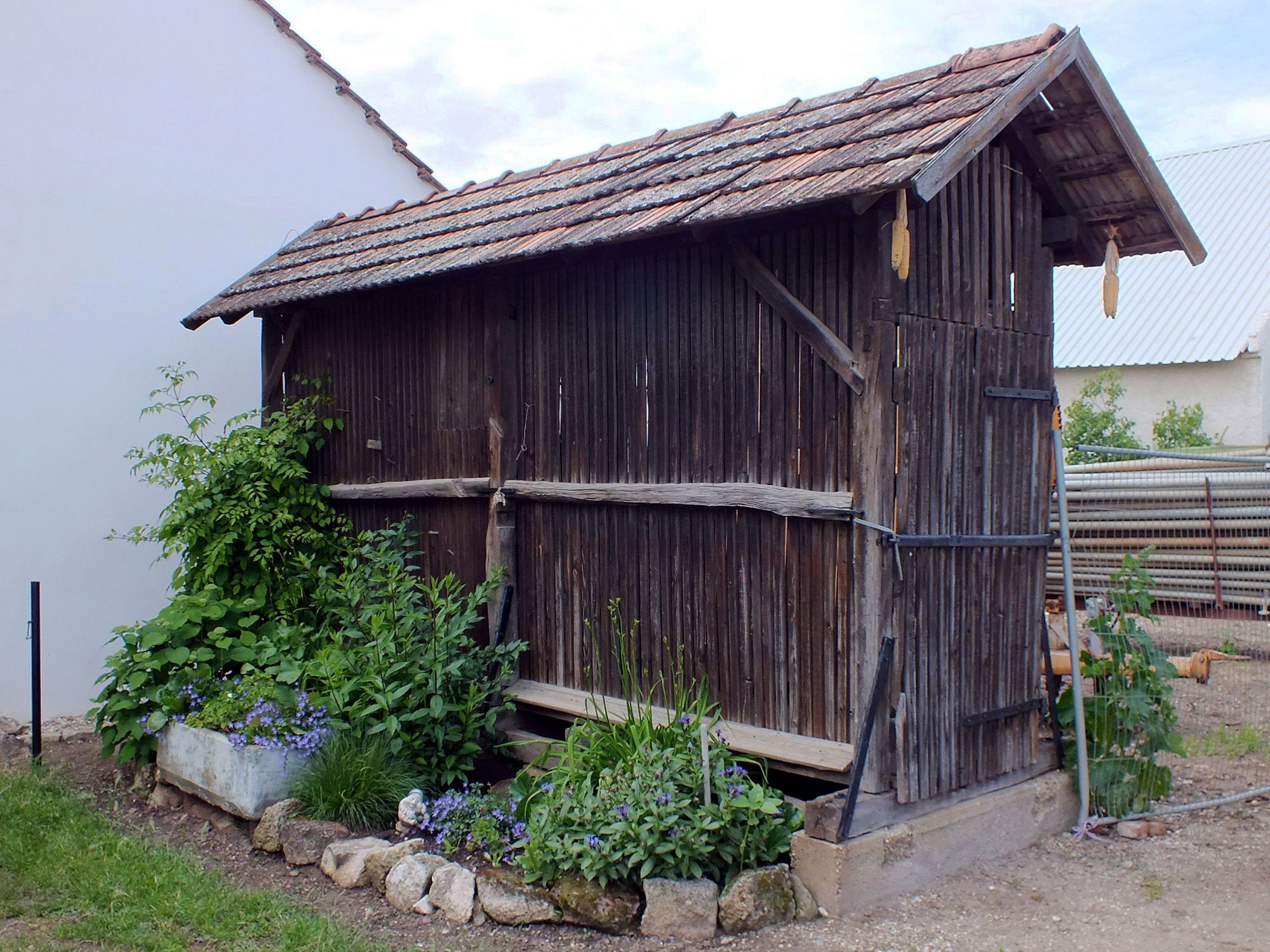 Tschardake in Halbturn (Burgenland, Österreich)